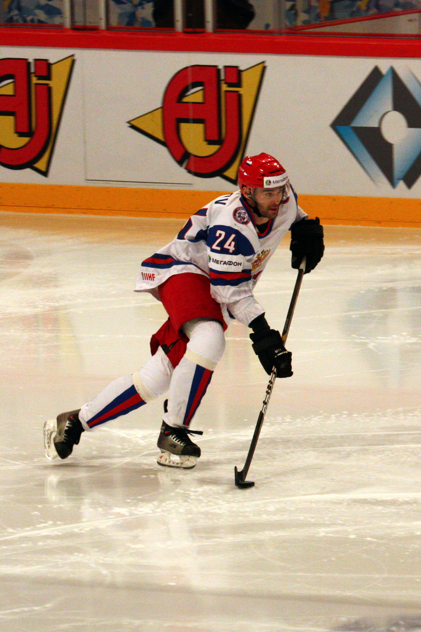 Александр Попов, ЧМ 2012, 15.05.2012, Россия-Италия, Стокгольм, Швеция